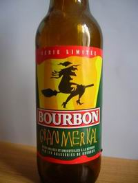 Gran MErkal bottle